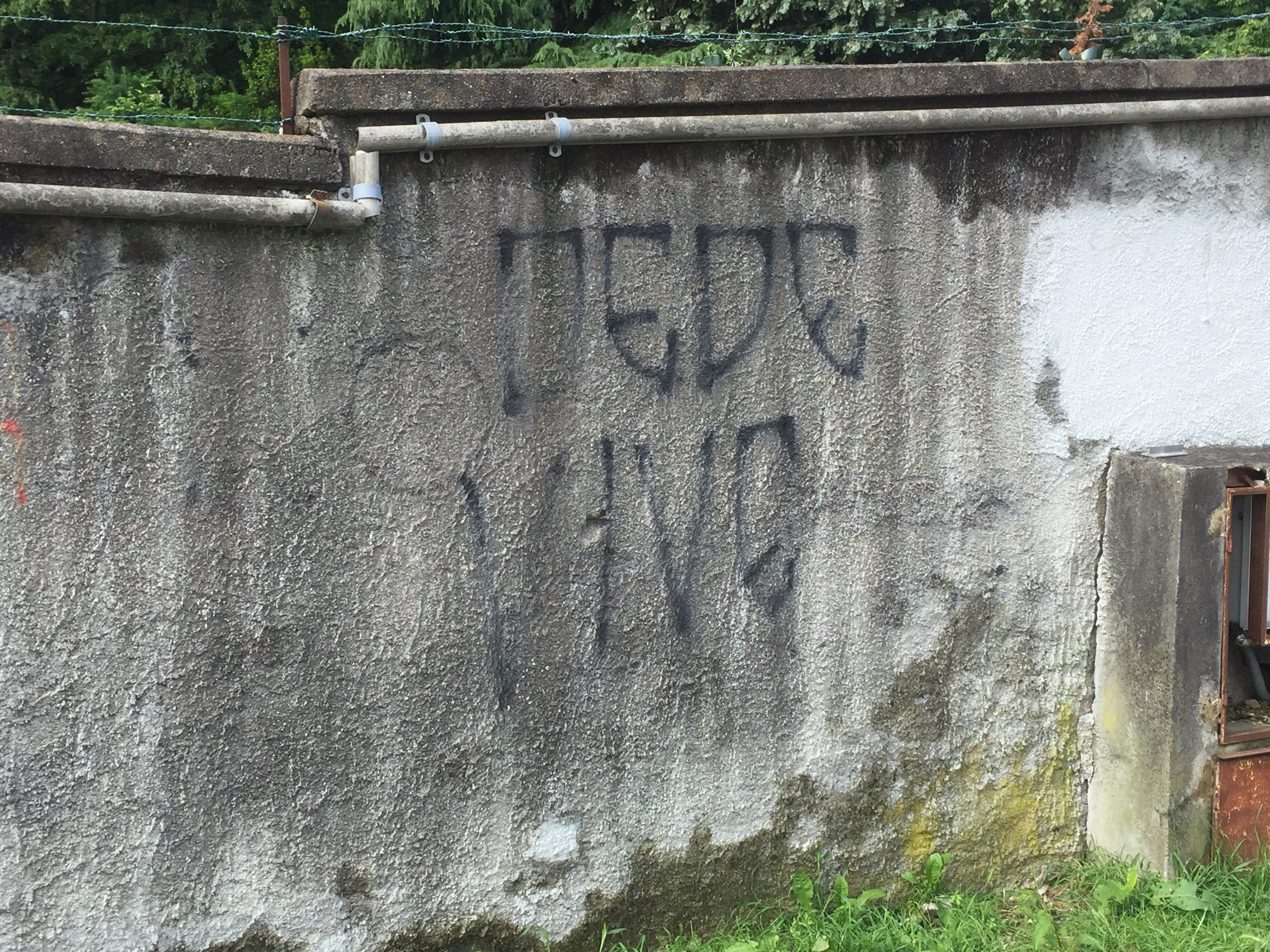 Un graffito alla memoria del capo ultrà Daniele "Dede" Belardinelli all'esterno dello Stadio Franco Ossola di Varese